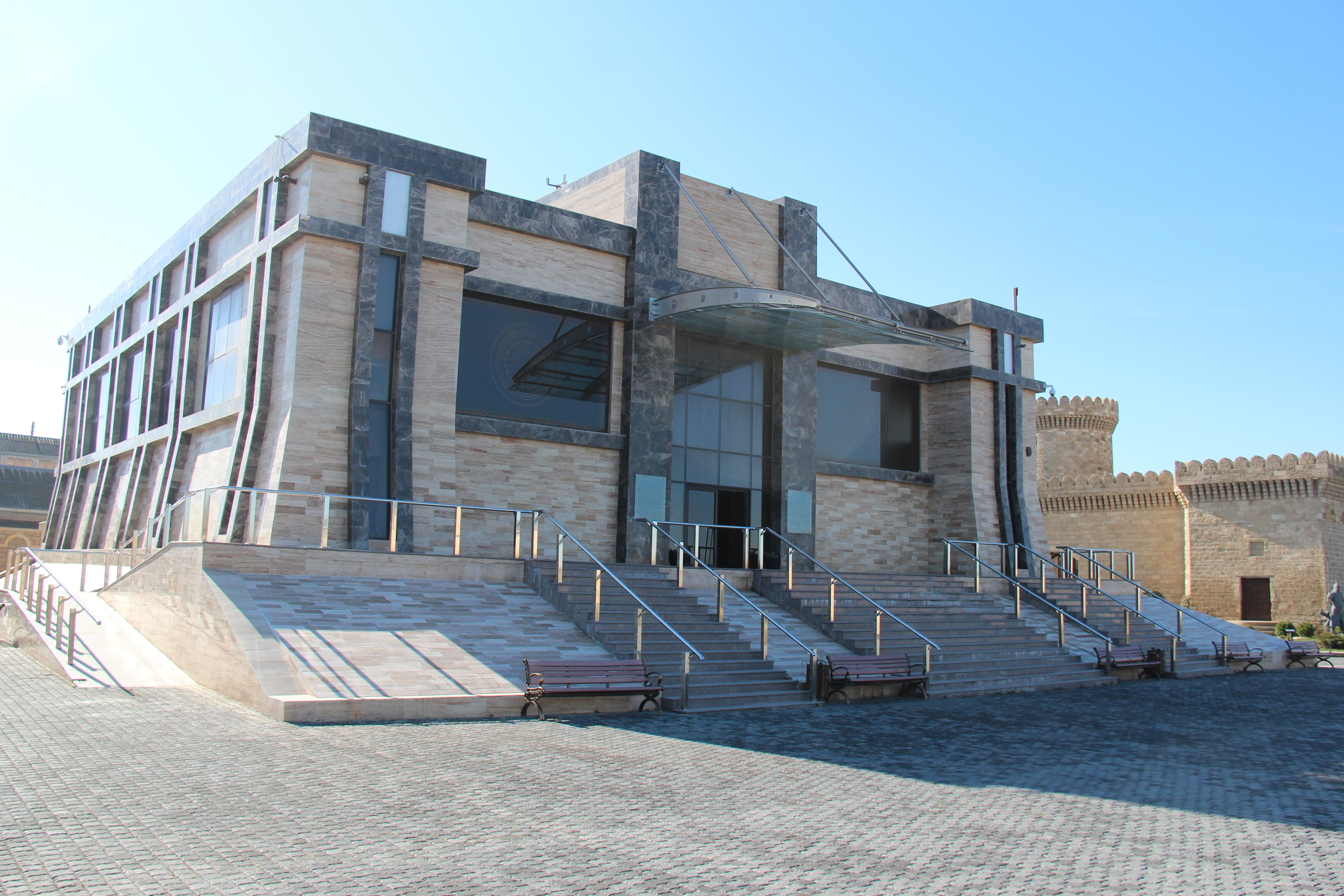 Qala - Museum of Antique items